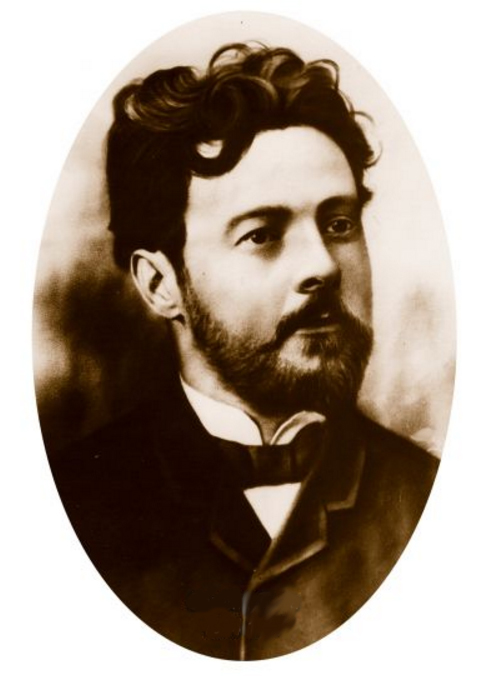 Serafim Terra